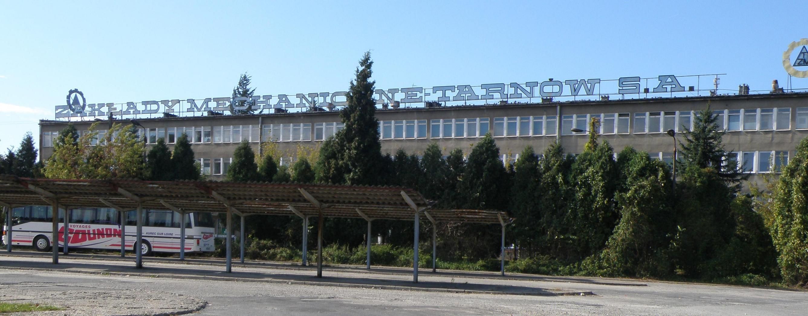 Zakłady Mechaniczne Tarnów S.A. - budynek administracyjny